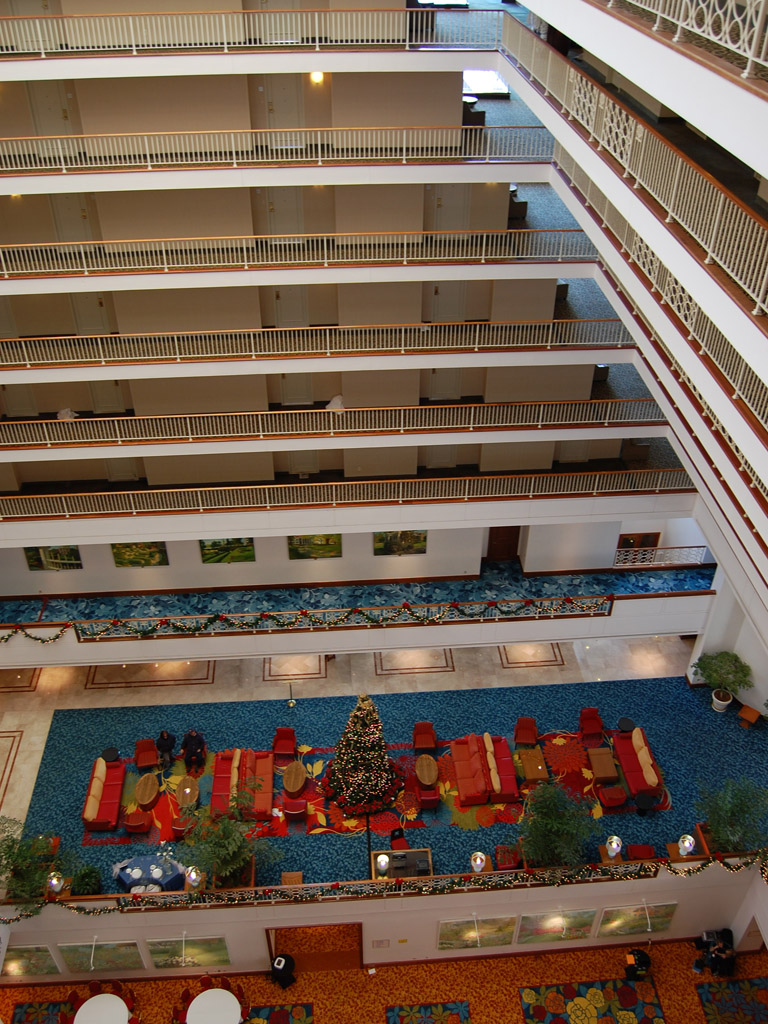 Renaissance Concourse Hotel Atlanta Airport